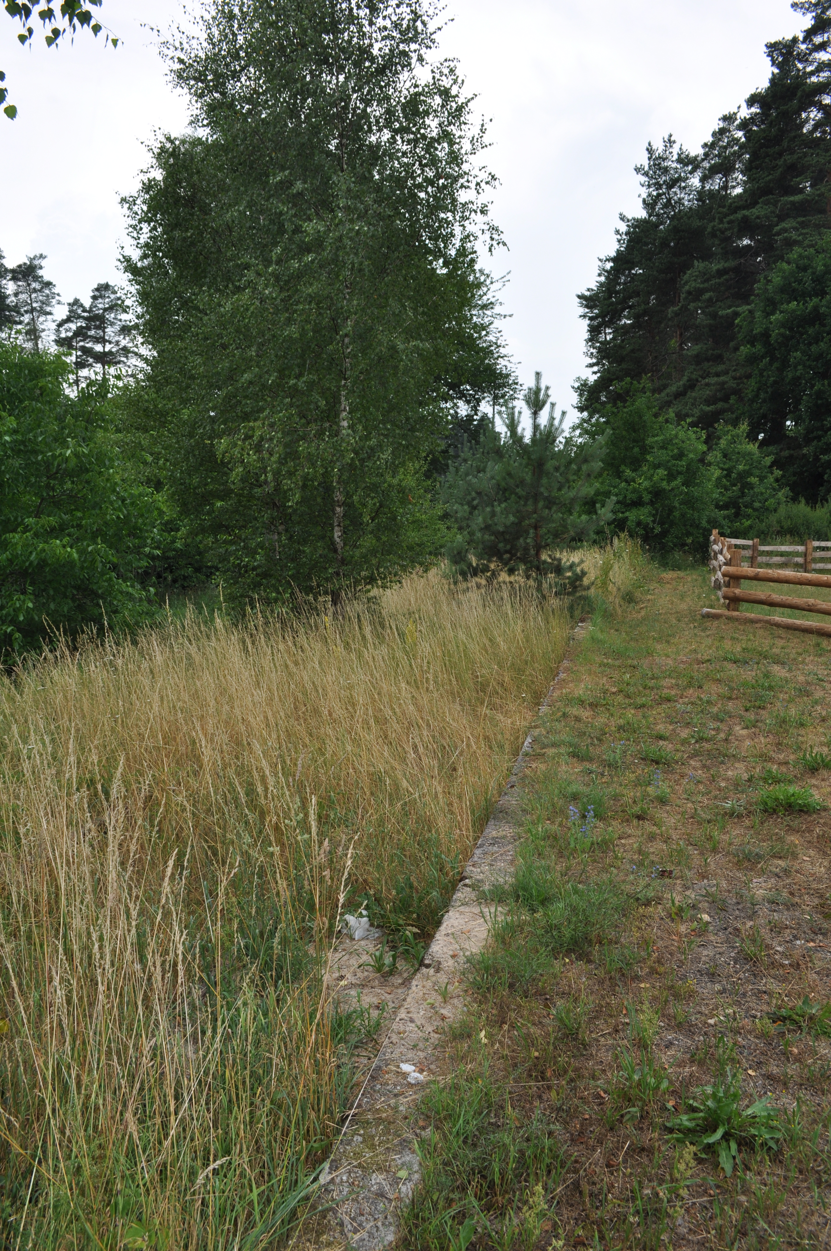 Krawędź peronu na zlikwidowanej stacji w Obliwicach